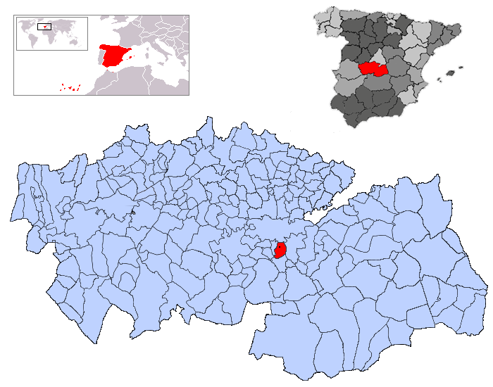 Burguillos de Toledo en la provincia de Toledo